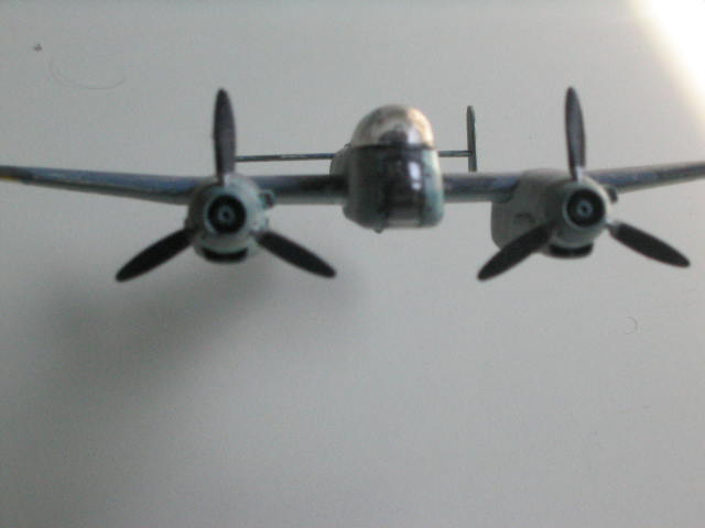 Das Bild zeigt ein von mir gebautes und photographiertes Modell der Arado Ar 240 von vorn.